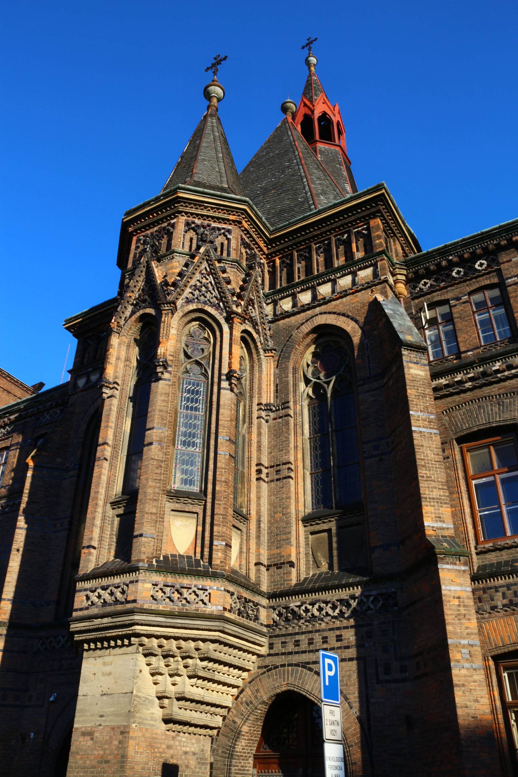 Praha, porodnice u Apolináře